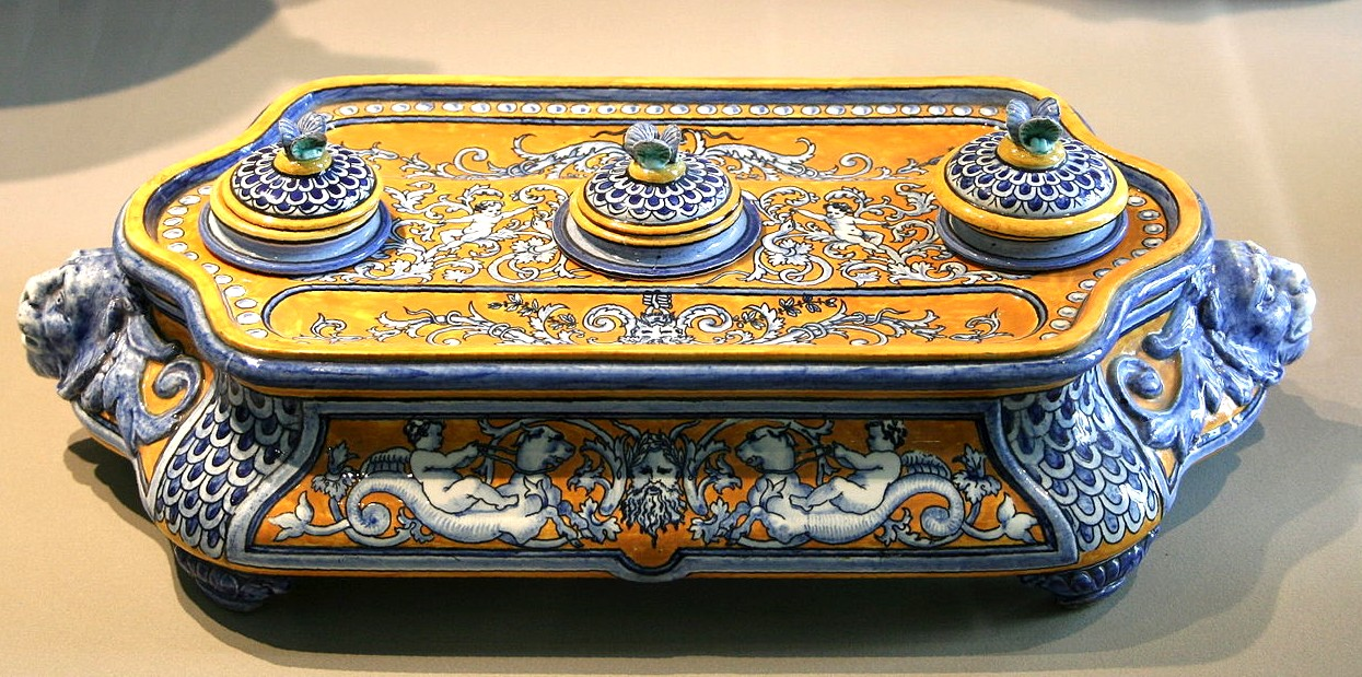 Musée de la faïence à Marseille, encrier de la fabrique Geoffroy-Guèrin à Gien, 1871, faïence fine, décor imprimé.